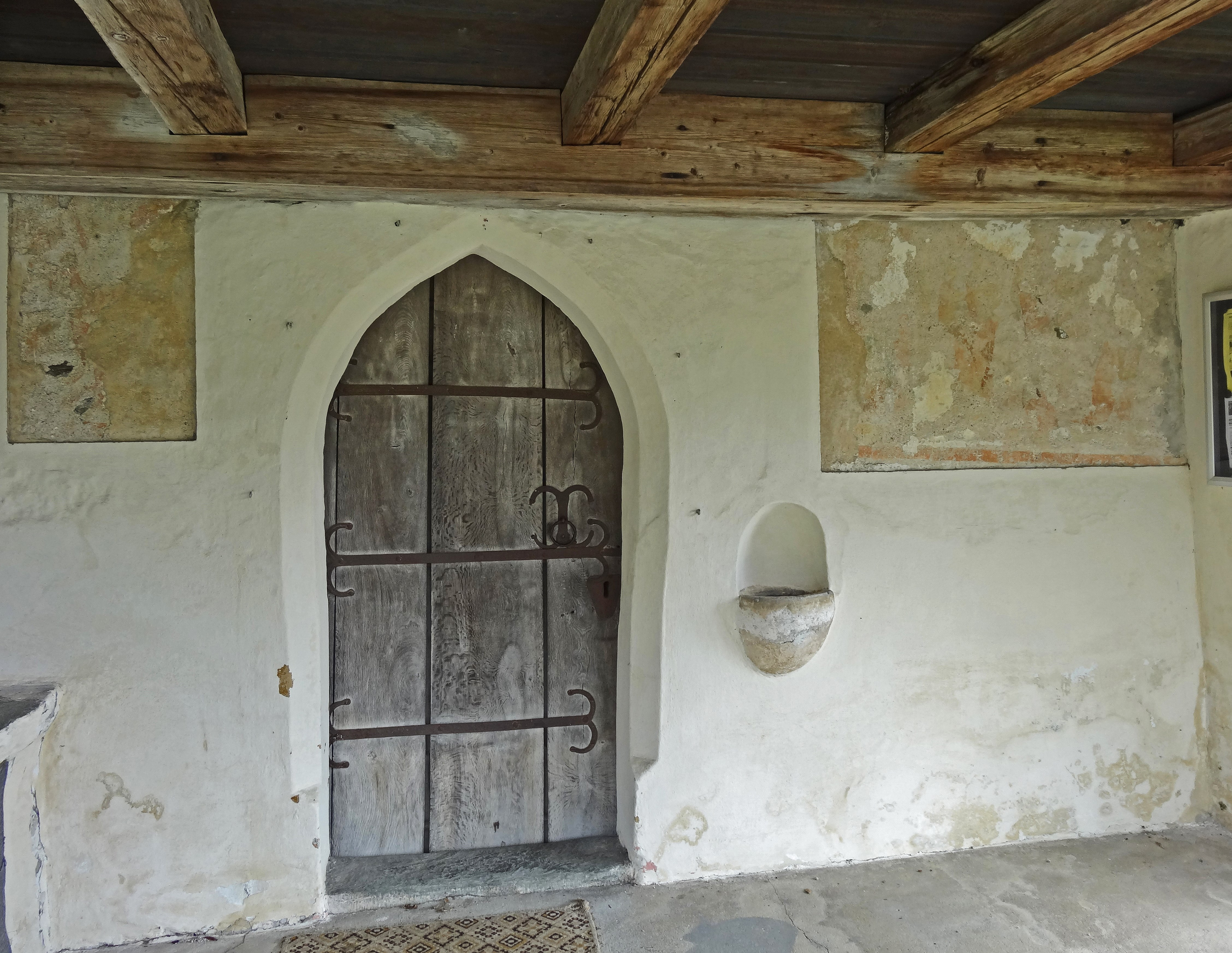 Kath. Filialkirche Hl. Lambert, Hart (Feldkirchen in Kärnten)